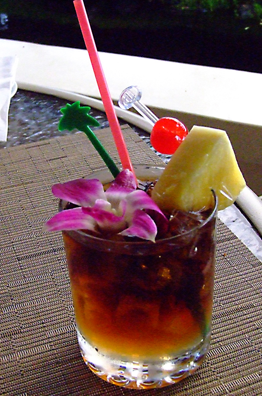 Mai Tai, in Waikiki, HI